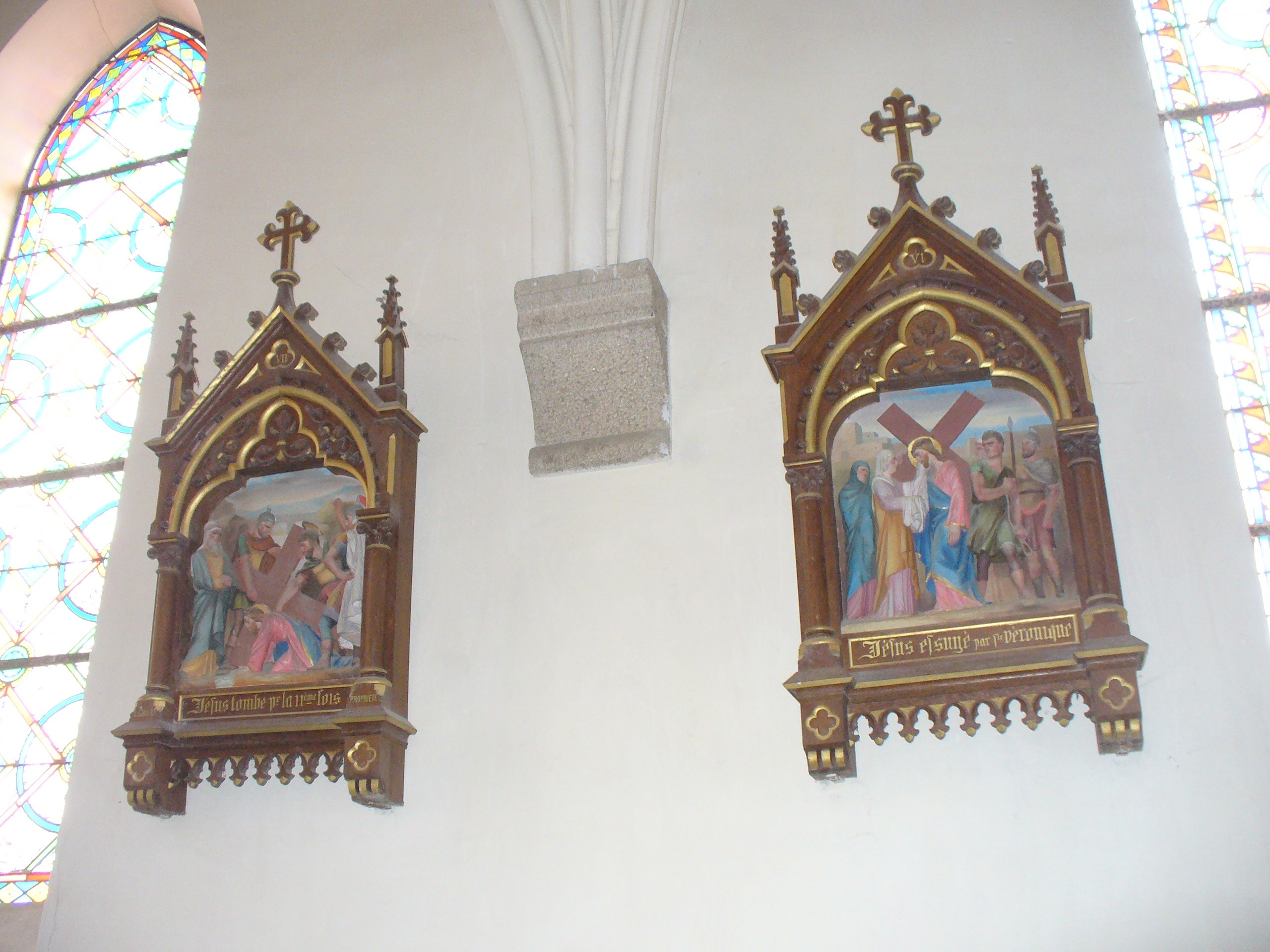 Plevenon Eglise-Departement Cotes de Armor-Bretagne-Frankreich 7.Juli2007 11.